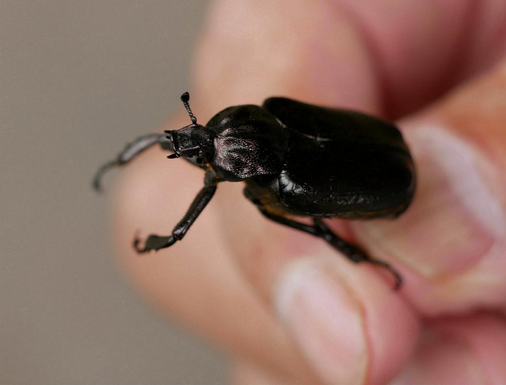 2019/08/05 和歌山県田辺市：Tanabe City. Wakayama Pref. Japan